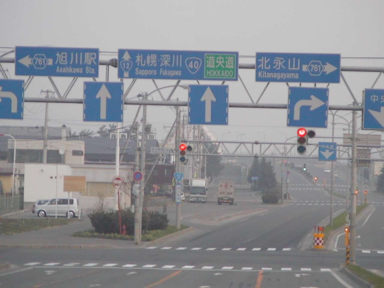 旭川新道（永山町6丁目）